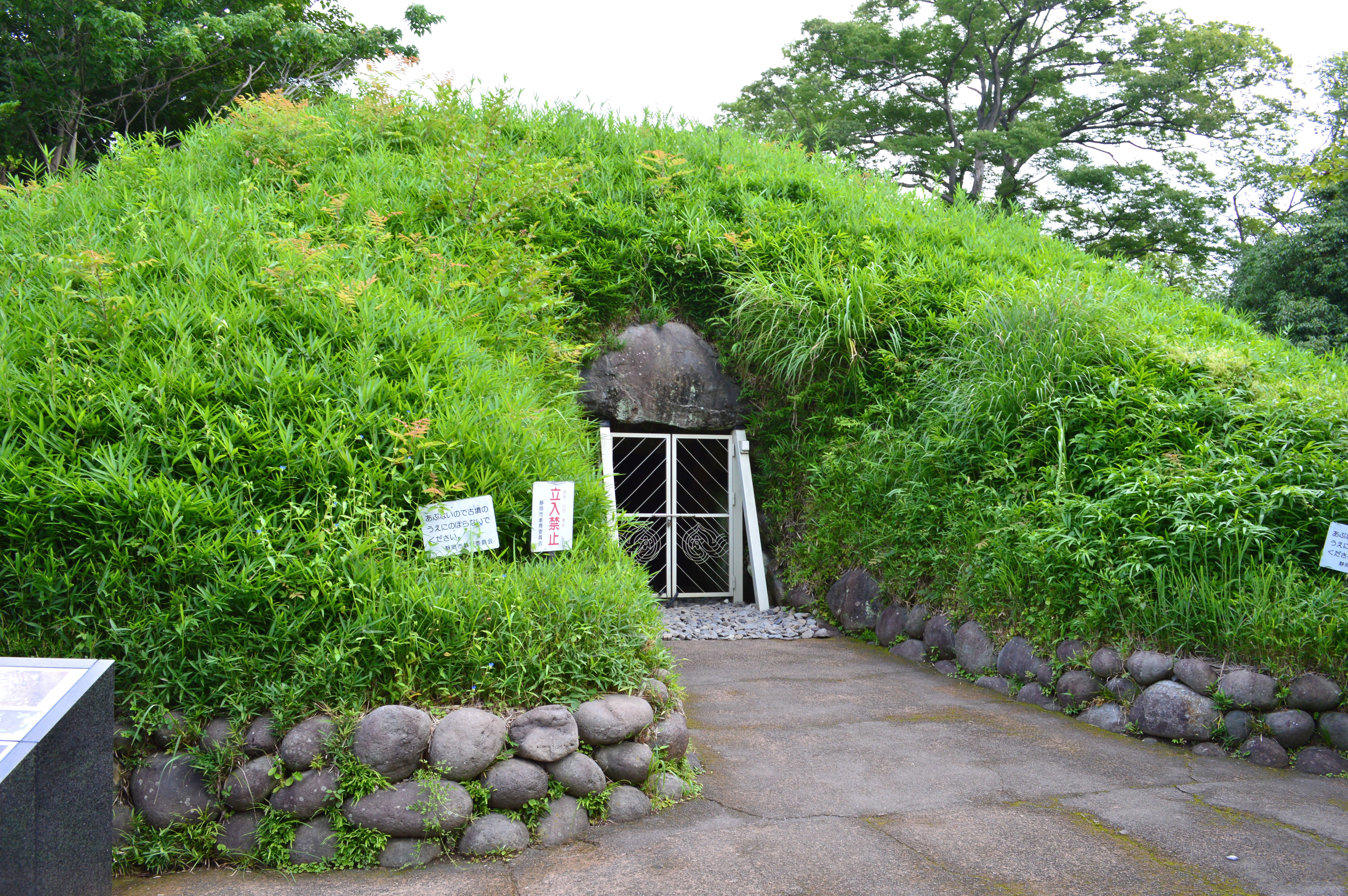 賤機山古墳 全景